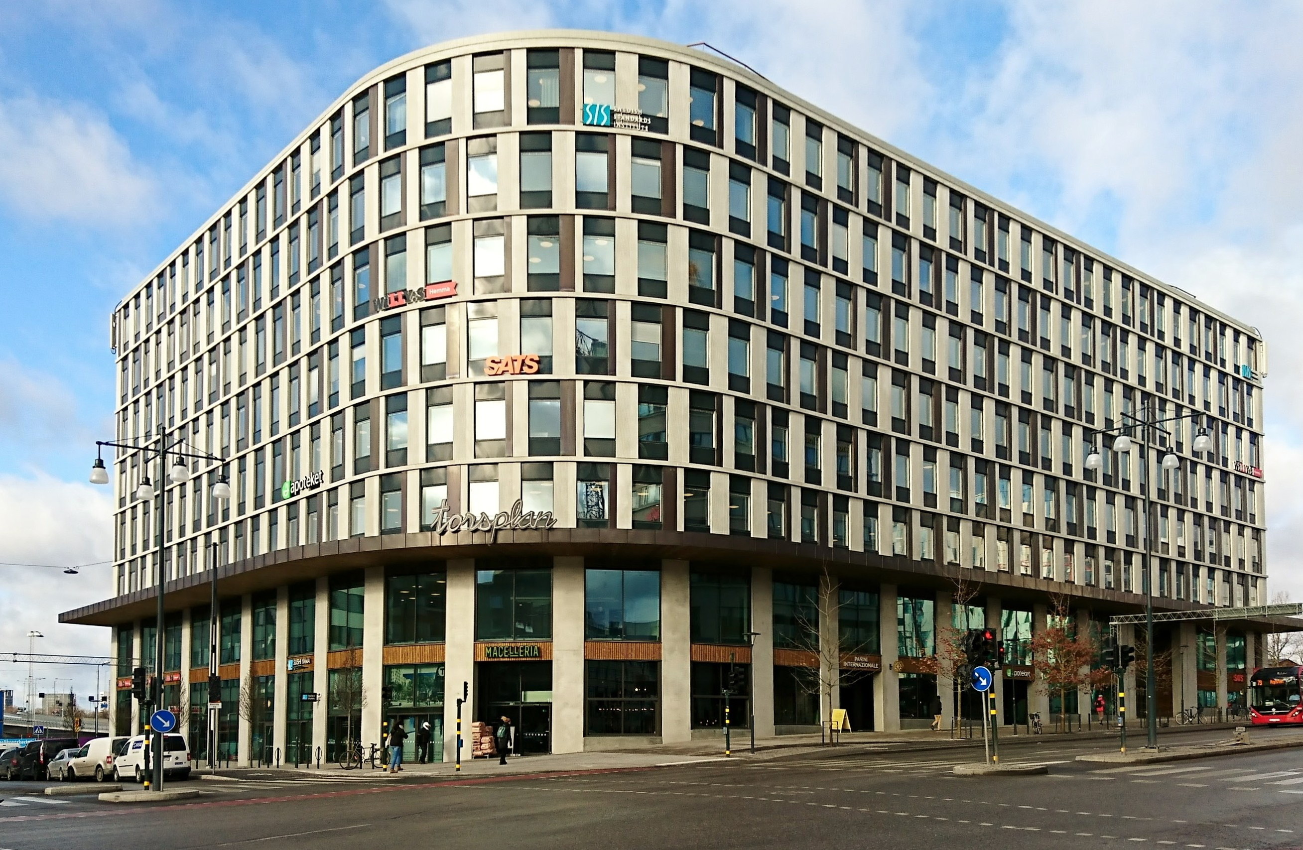 Solnavägen 1 (kvarteret Isotopen) med entré till Hagastadens tunnelbanestation.